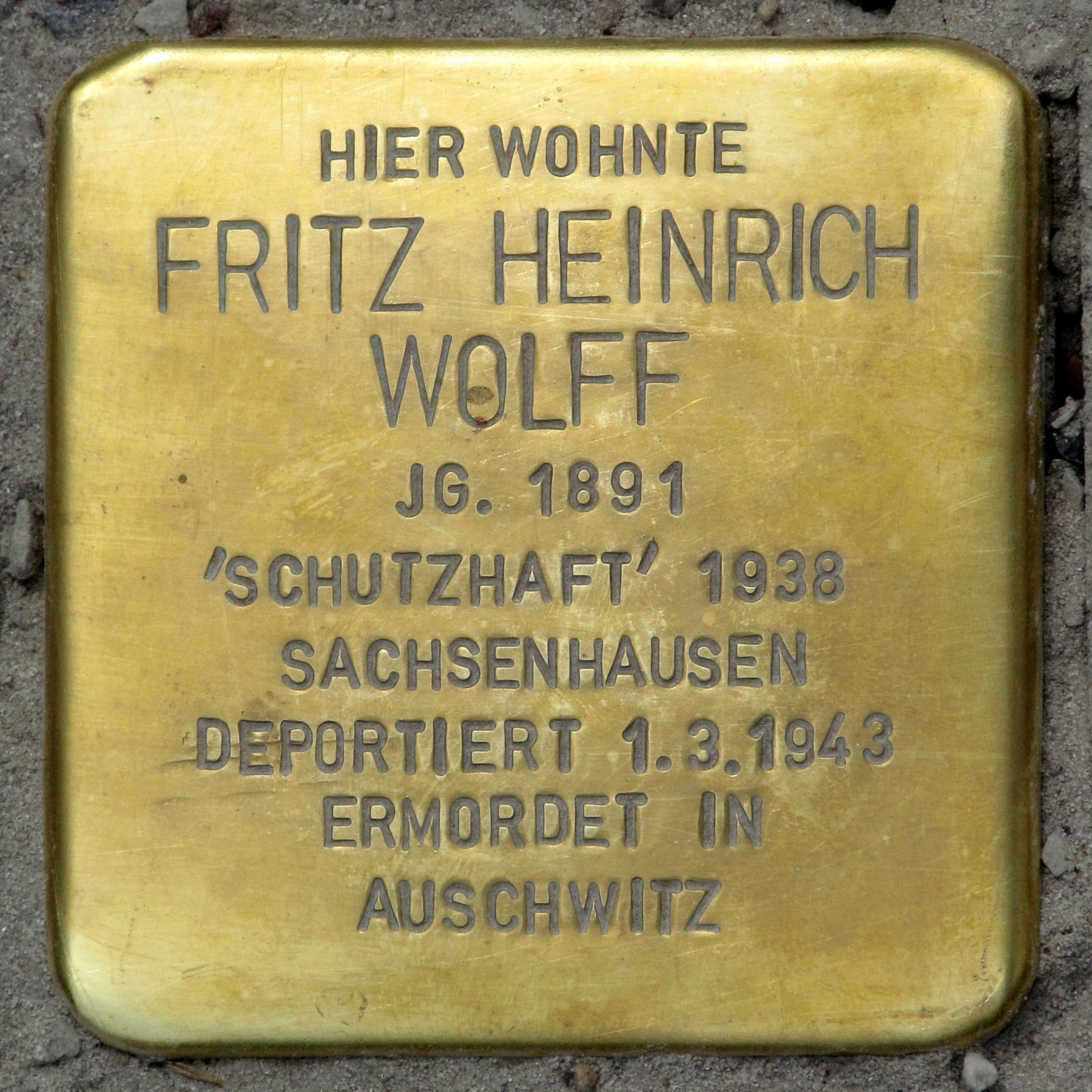 Stolperstein für Fritz Heinrich Wolff, Dresdener Straße 95, Berlin-Mitte Die Geschichte von Fritz Wolff und seiner Vorfahren wird berichtet in: Dina Gold: Stolen Legacy - Nazi Theft and the Quest for Justice at Krausenstrasse 17/18, Berlin. 2. überarbeitete und ergänzte Auflage. Ankerwycke Books, USA 2016, ISBN 978-1-63425-427-4 (englisch). Die Verlegung des Stolpersteins wird geschildert auf den Seiten 253-255.